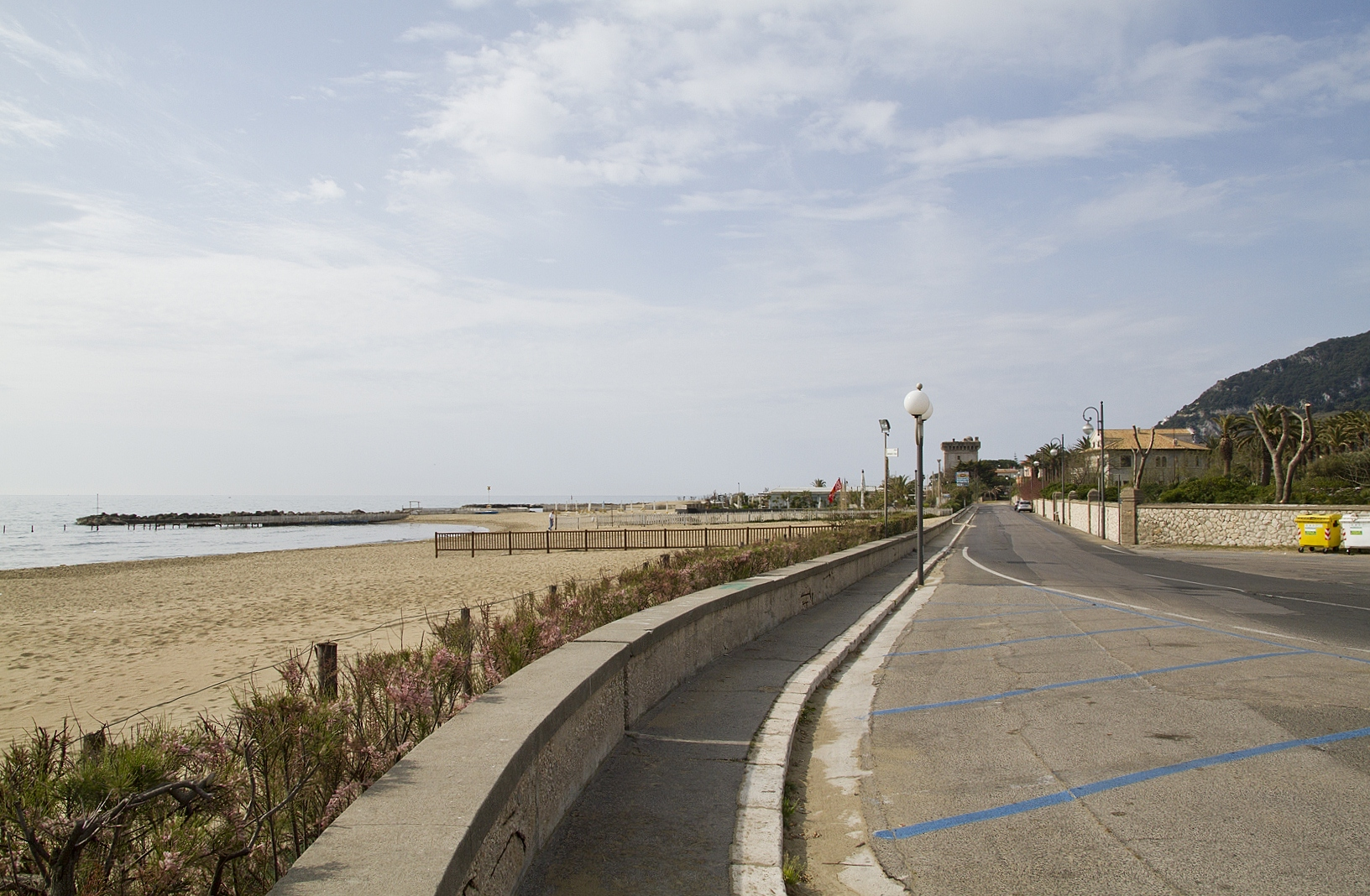 Spiaggia San Felice, Circeo LT, Lazio, Italy